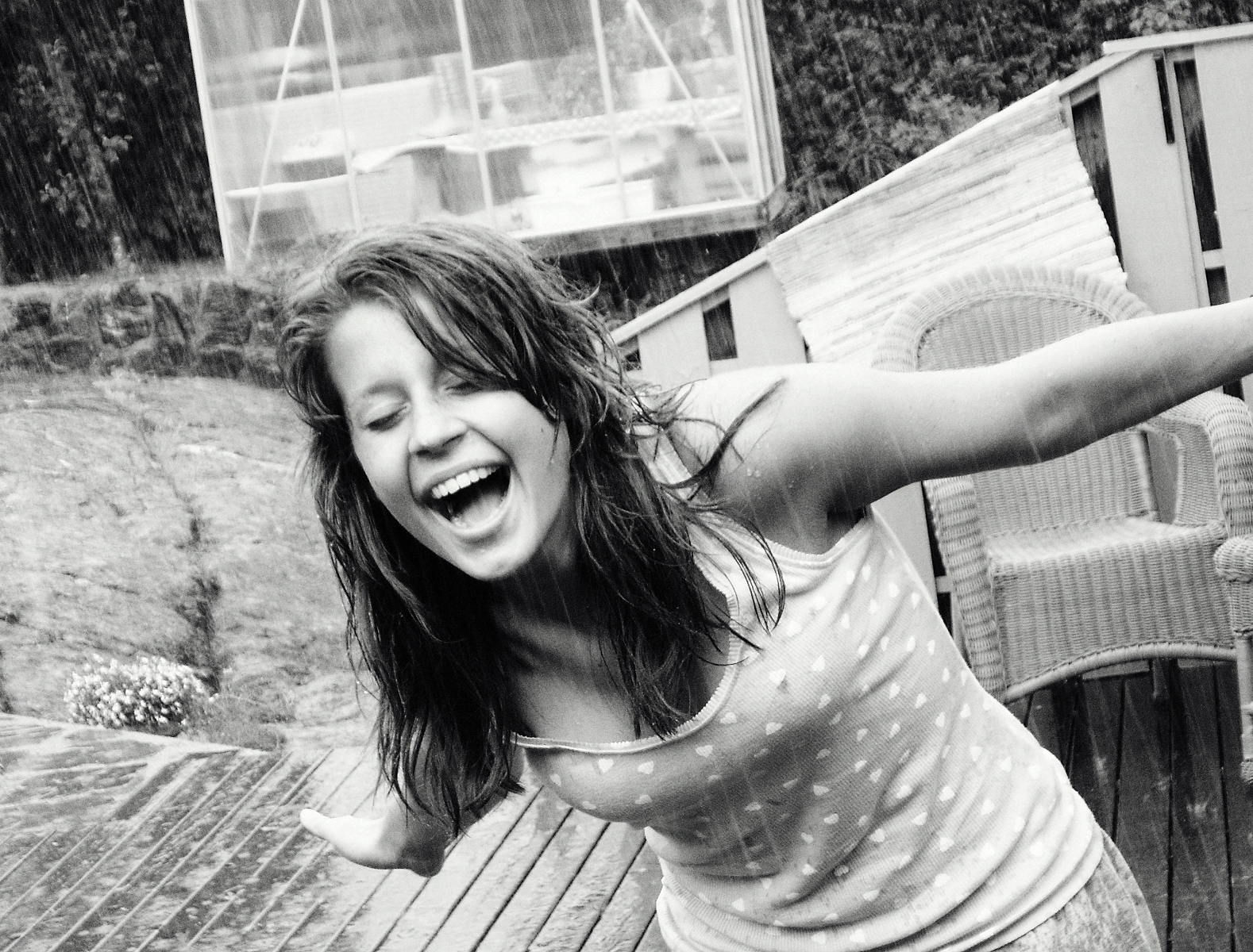 Grimstad, Norway